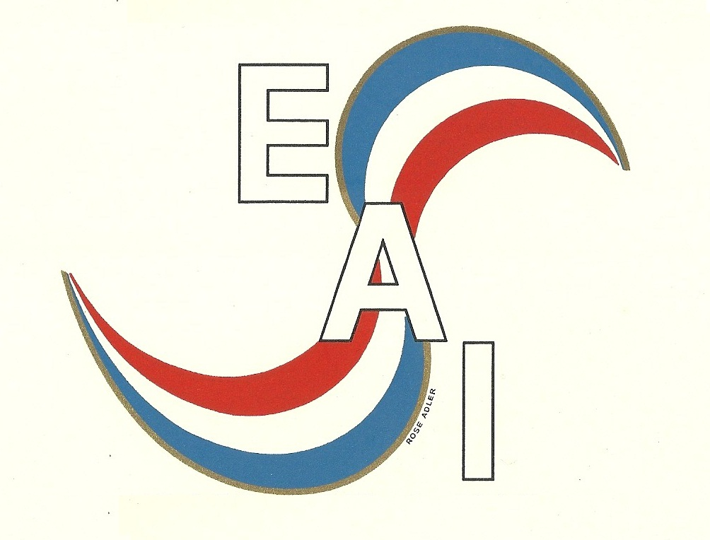 LOGO Société d'encouragement à l'art et à l'industrie SEAI 1950